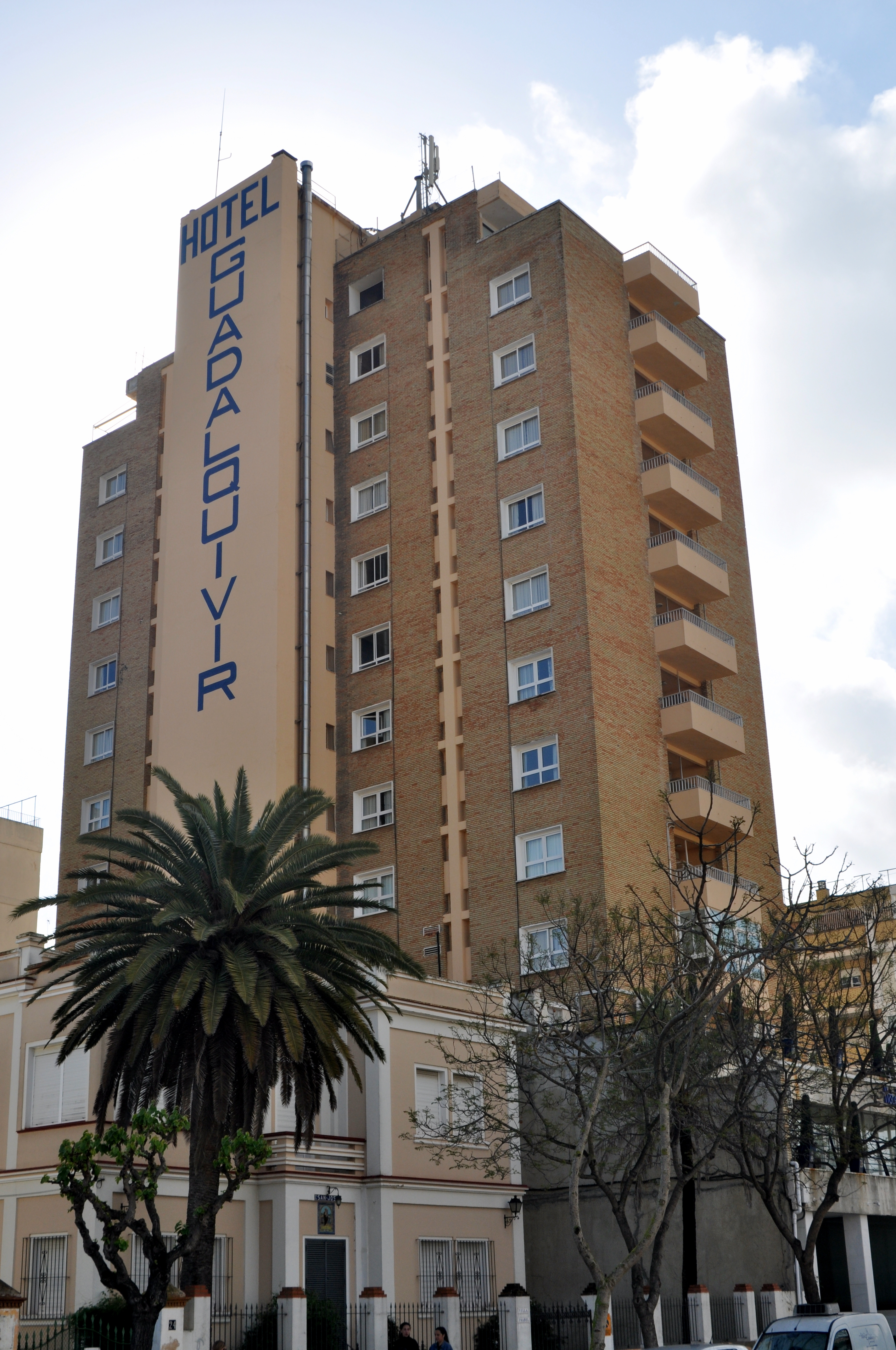 Hotel Guadalquivir en Sanlúcar de Barrameda (Cádiz, España)